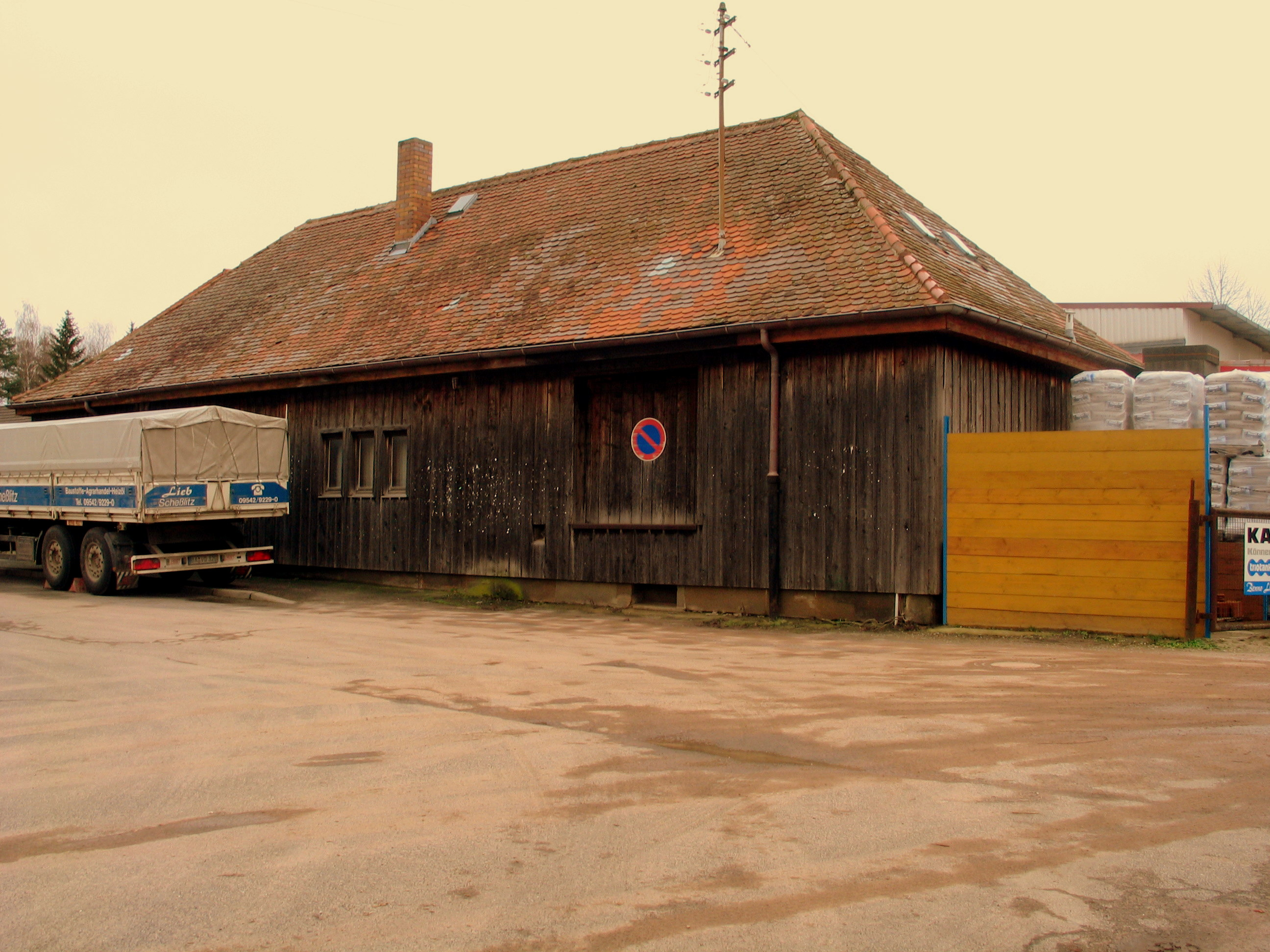 de Scheßlitz: Ehemaliger Bahnhof. en Scheßlitz: Train station at the suspended railway line from Bamberg to Scheßlitz. it Scheßlitz: La stazione alla ferrovia chiusa da Bamberg a Scheßlitz.